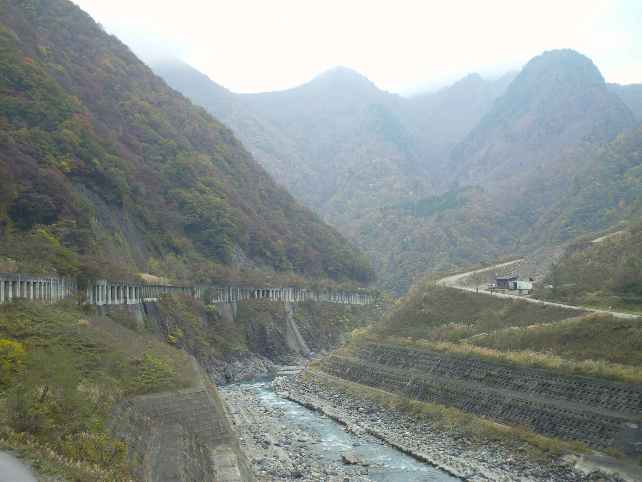 国道148号、洞門群